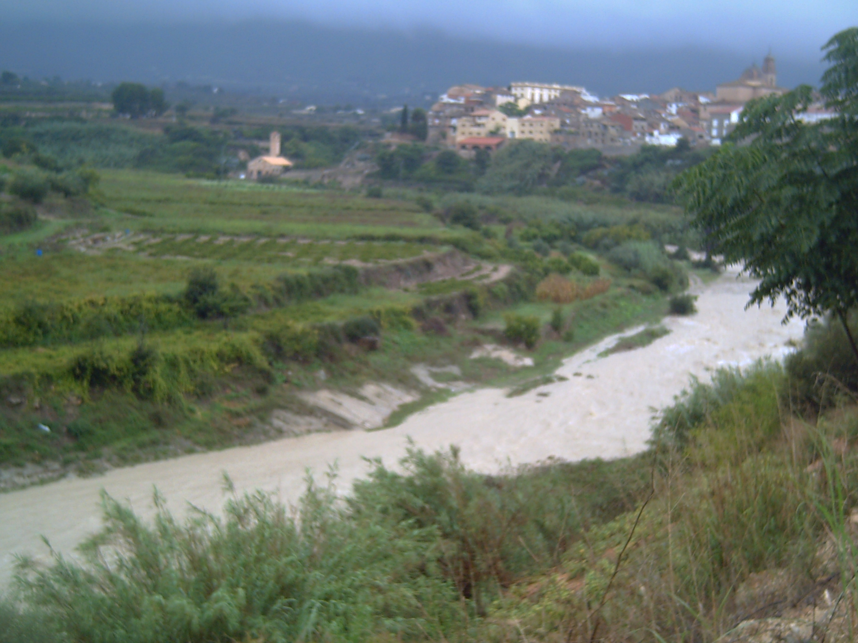 El riu Clarià després de la forta ploguda al octubre de 2007